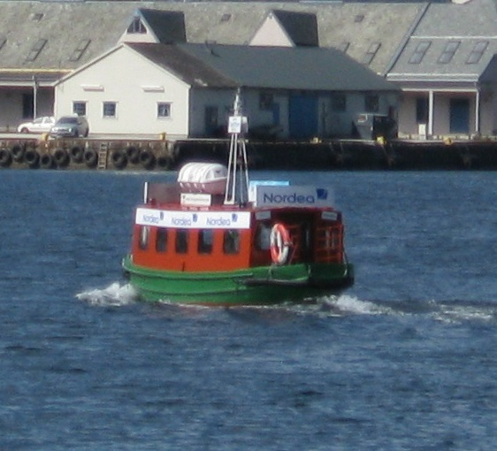 Den lille passasjerfergen "Beffen" på Vågen i Bergen